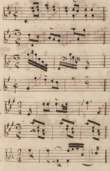 Table du volume II des manuscrits de Venise (incipit des sonates 1 à 7, K. 177 à 183)